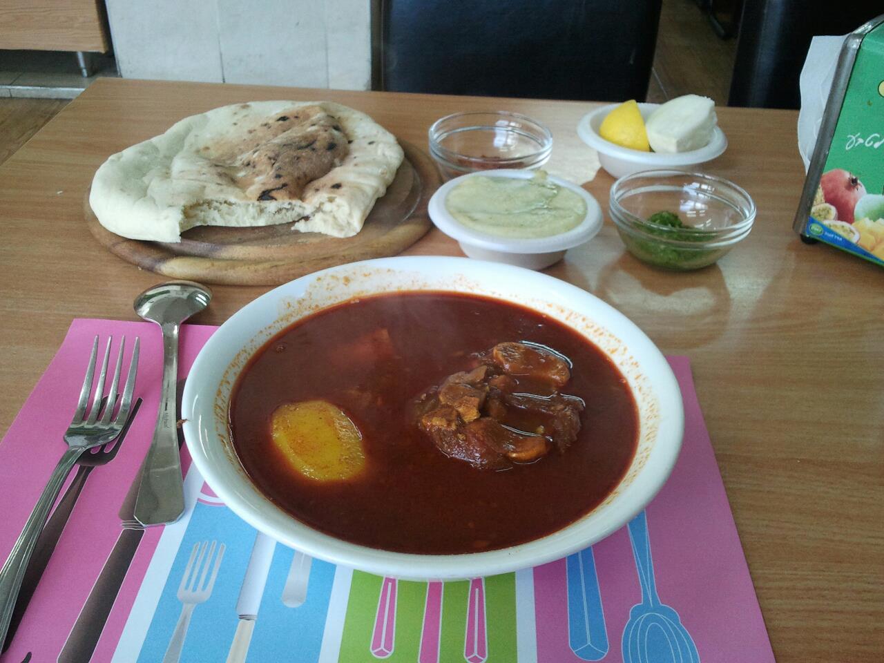 מרק רגל תימני